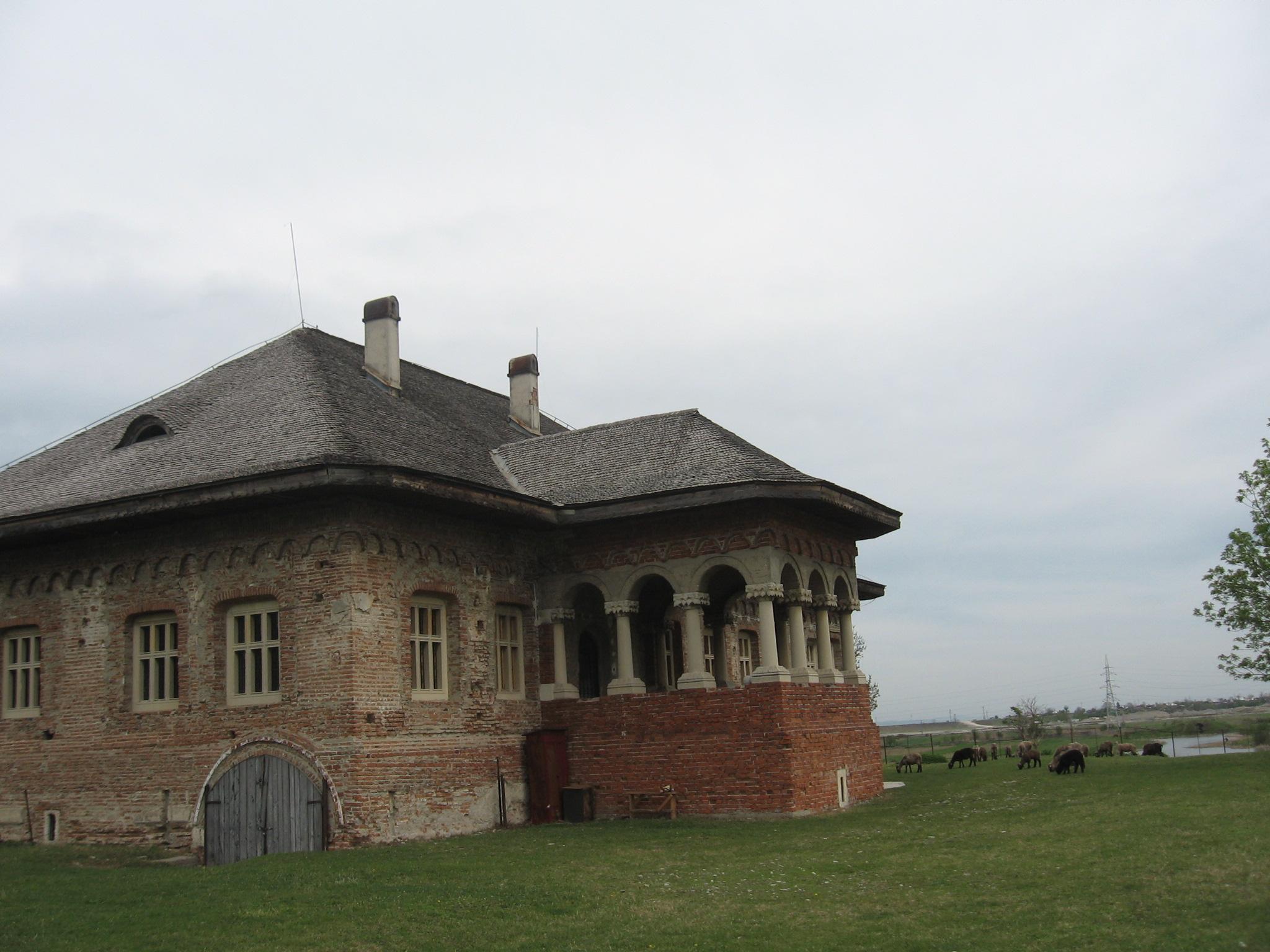 am citit intr-un ghid mai vechi de 20 de ani ca se avea in vedere infiintarea unui muzeu de arta feudala aici. Nici urma de el, desi conacul e atit de frumos. Unele ferestre nici nu sint acoperite, au un fel de grilaje, deci incaperile sunt total neprotejate (poate bate ploaia inauntru, intra zapada...). Si par frumoase camerele (au un fel de bolti semicilindrice si o acustica deosebita...) Pina una alta, in parcul inconjurator isi pasc satenii caprele, iar copii se joaca si ei pe unde apuca, escaladind foisorul in stil brancovenesc etc etc.